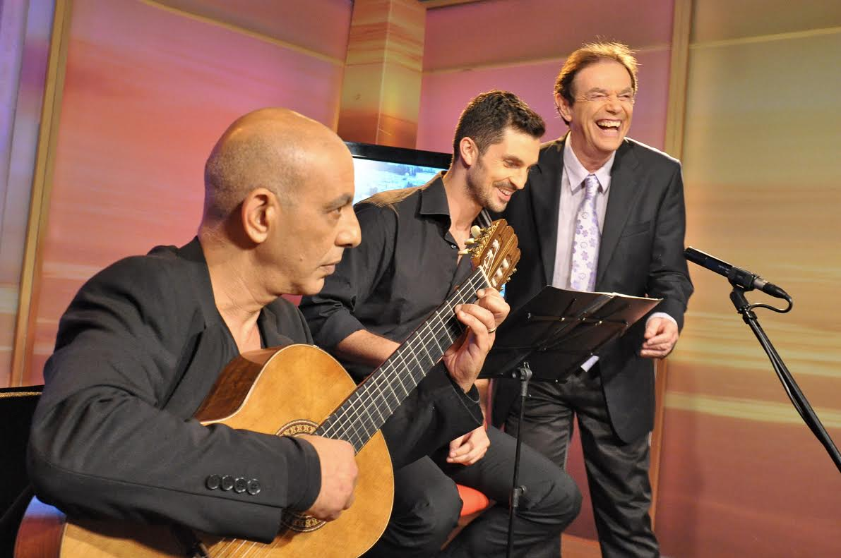 Arye Yass